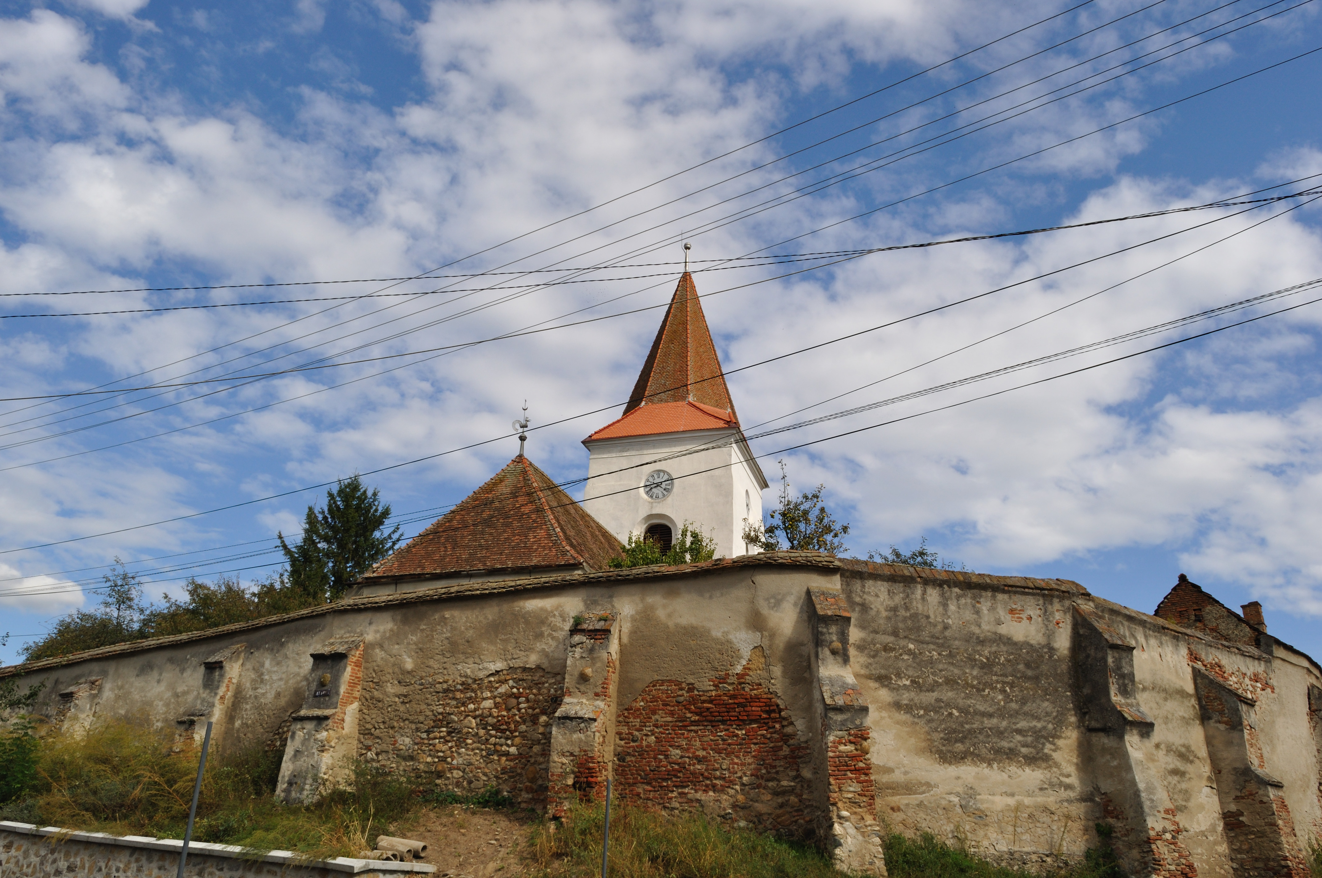 Biserica reformată din Ocna Sibiului